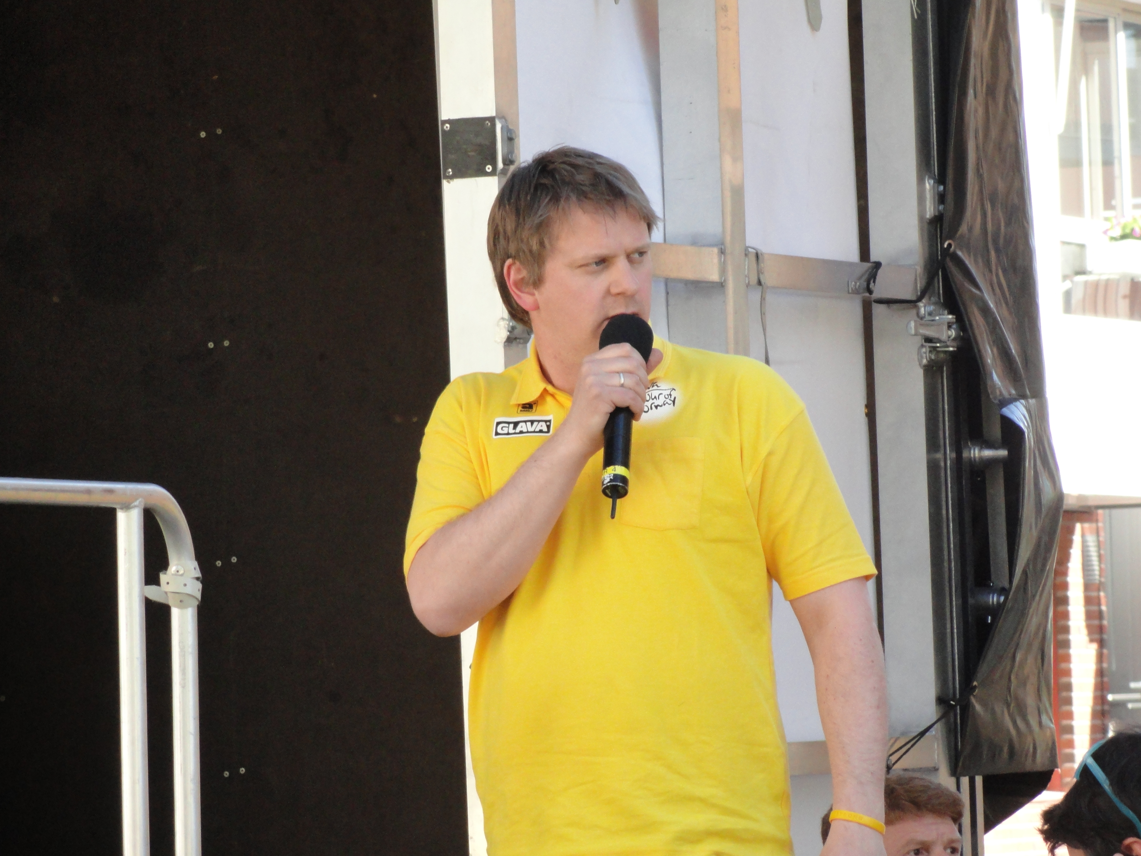 Bilde av den norske sportskommentatoren Ole Kristian Stoltenberg